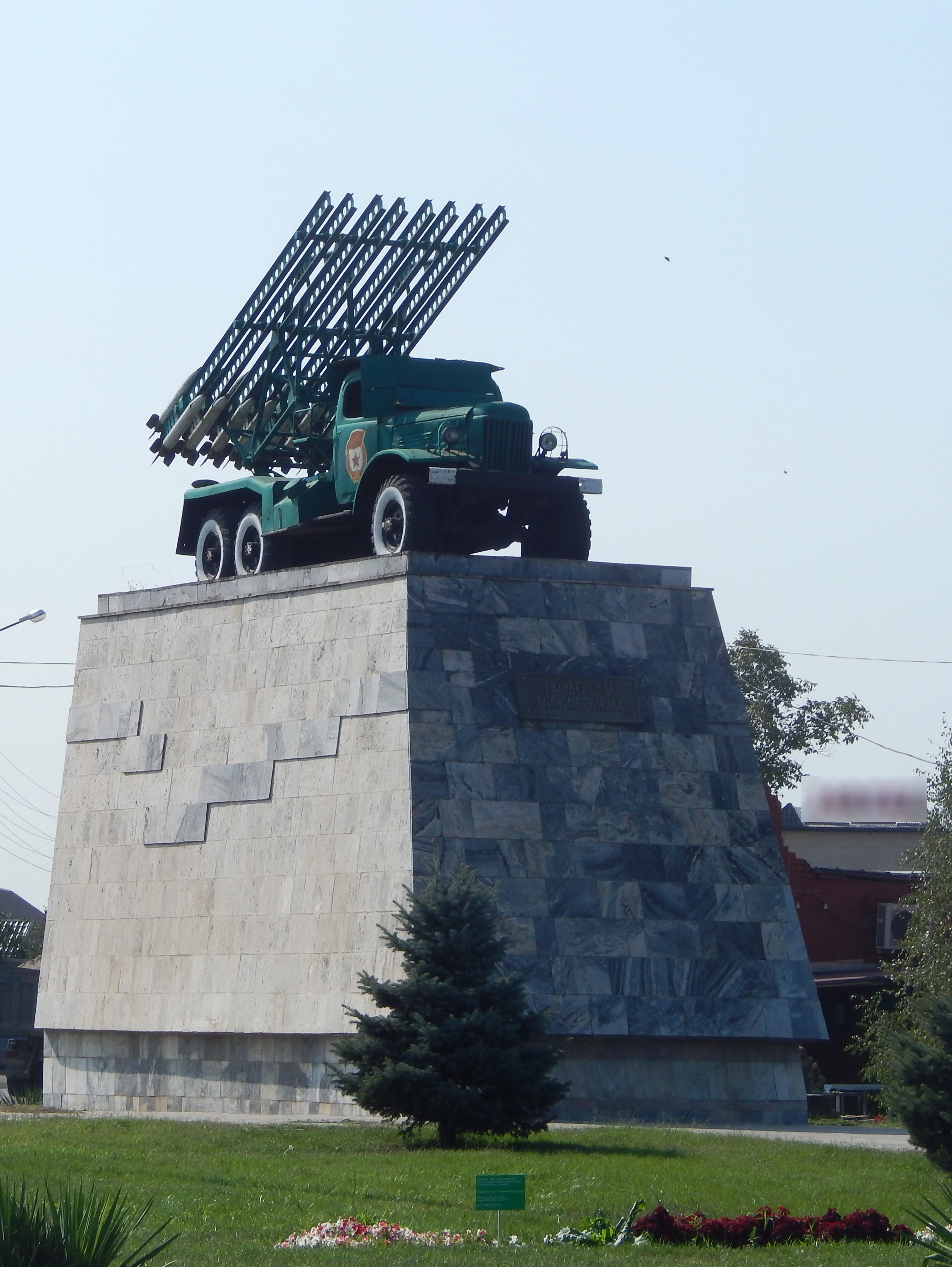 Реактивное орудие "Катюша", установленное в честь гвардейцев-минометчиков, защищавших Кубань от фашистских захватчиков: шоссе Ростовское / улица Российская, Краснодар, Краснодарский край